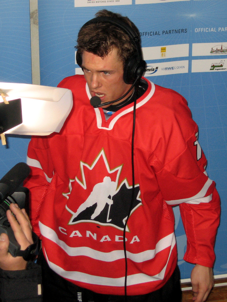 IIHF U18 WC 2011, Group B, Sweden vs. Canada 4:2, EnergieVerbund Arena, Dresden